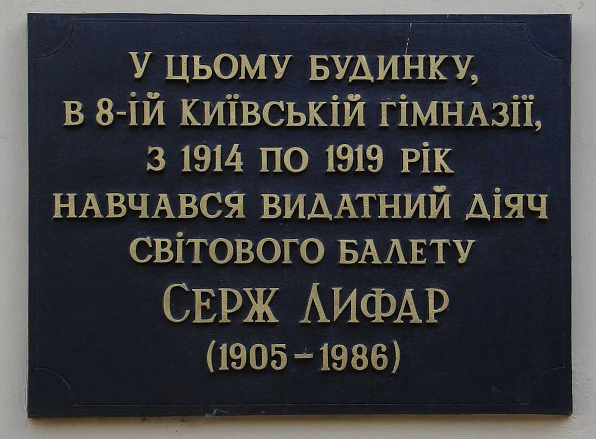 Меморіальна дошка на честь С. Лифаря (Київ, площа Івана Франка)